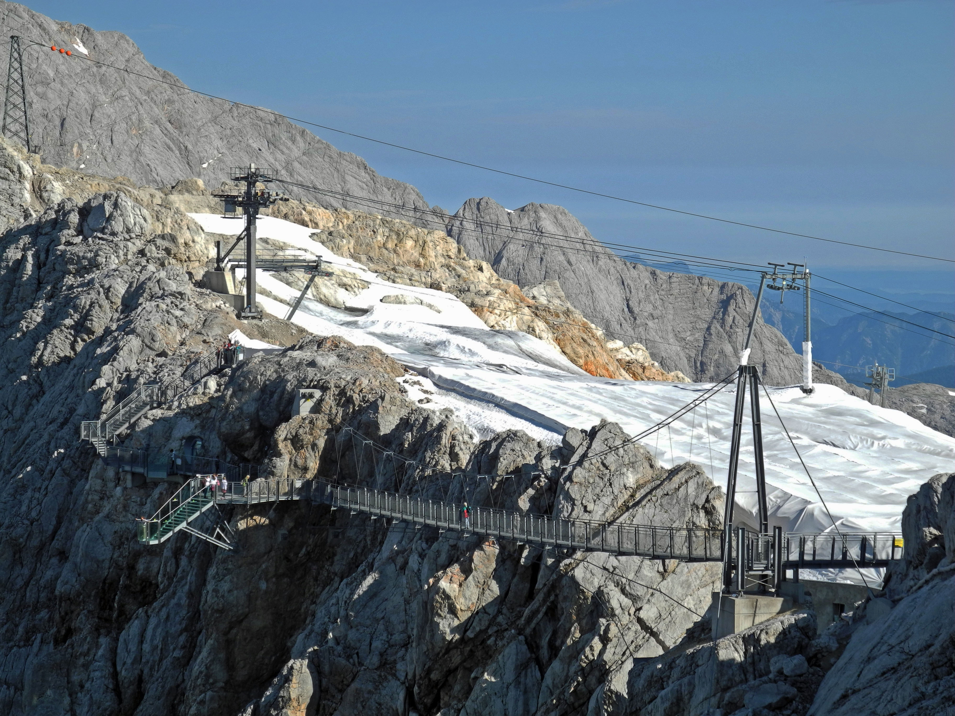 Dachstein-Aussichtsplattform auf dem Hunerkogel (2700 m)